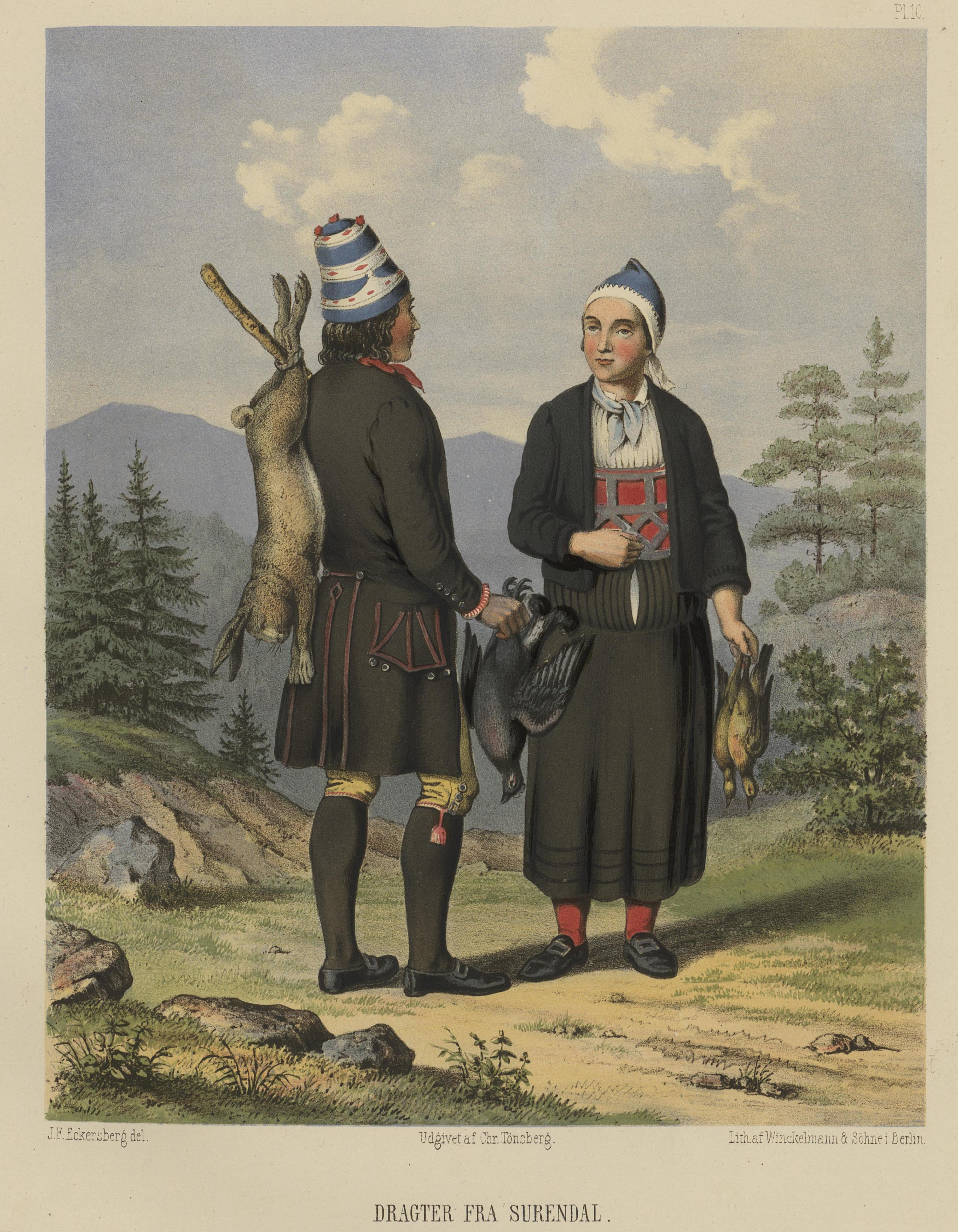 Illustrasjon hentet fra boken "Udvalgte norske Nationaldragter" av ukjent forfatter og utgitt av Chr. Tønsberg (no, [1861])